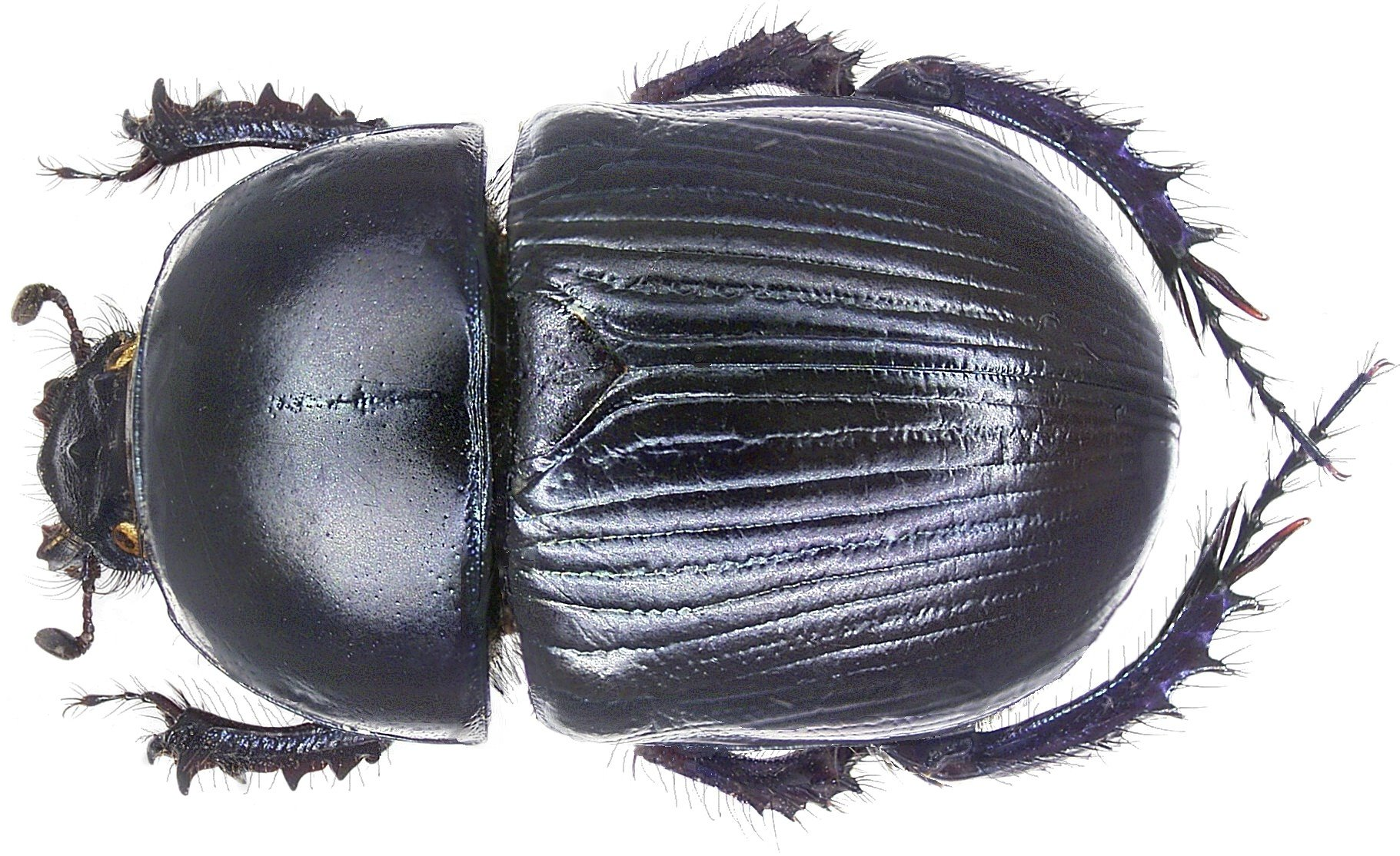 Familie: Geotrupidae Groesse: 18-26 mm Verbreitung: Europa, Kleinasien Fundort: Korsika, Gishonaccia, Marina d`Oru leg. U.Eitschberger, 1987; det. U.Schmidt Photo: U.Schmidt, 2005